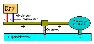 Eigen creatie